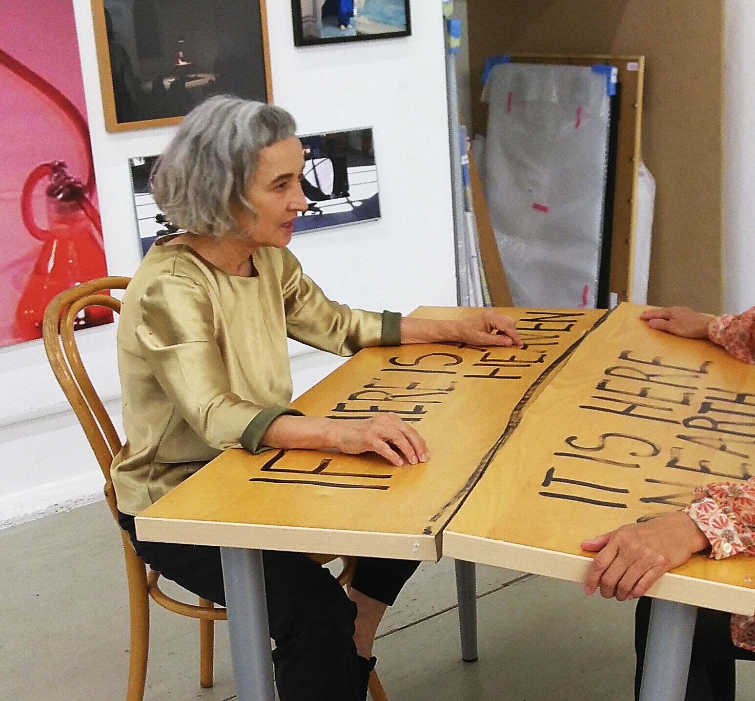 Dorothea Rust, If There Is A Heaven performative intervention Liste 2018 PANCH @ Kaskadenkondensator Basel